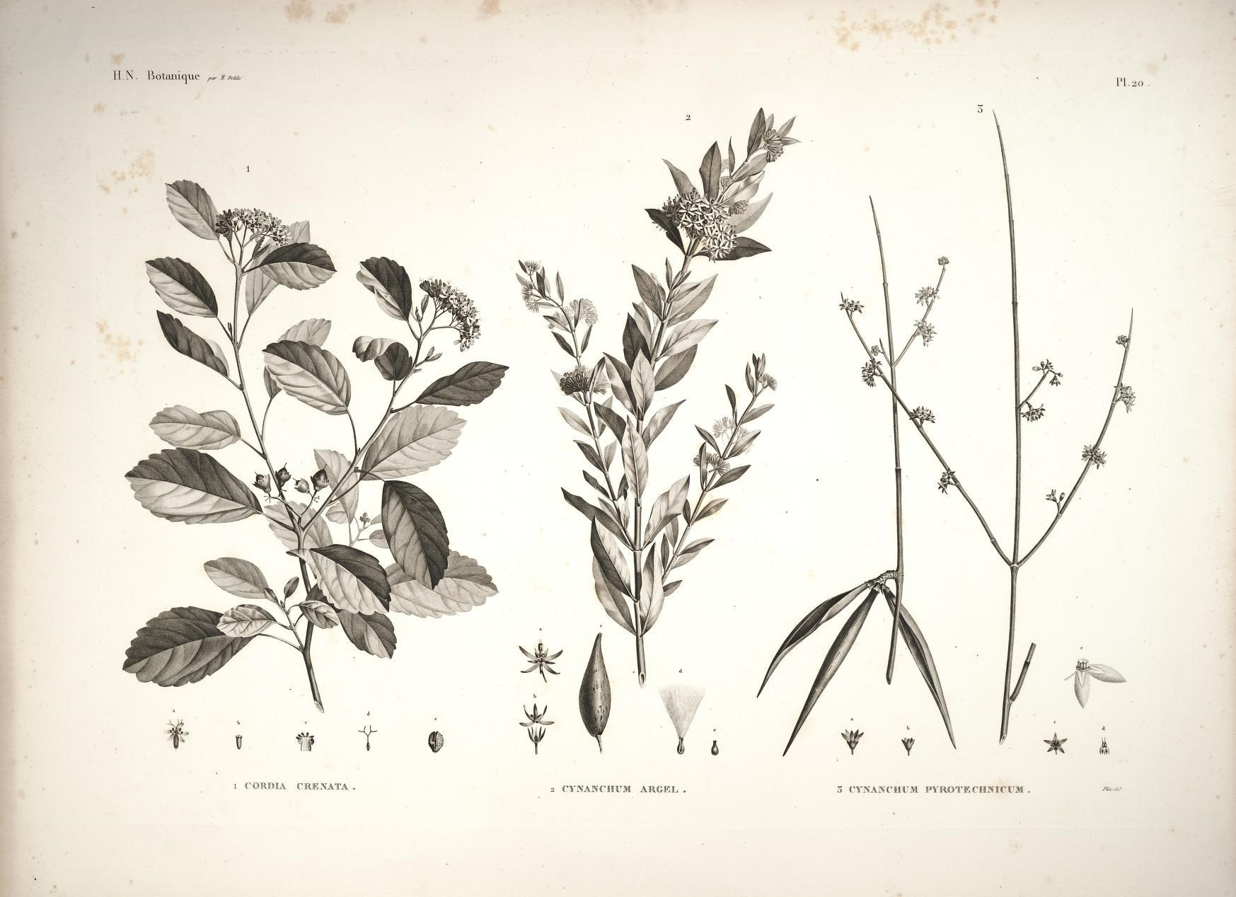 ■ . . ^ -■ UN. pa/' M. J)eM/c V j PI. 20 y / s 1 , \ . t _i n ■ \ X . )' -^ I / \ K \ ' ^ 4 Y * - ^ 1 cre:^^ata 2 CYNANCIIF ARGRI J o 5 ANC. HUM 5TECH:N'irïTM » yiitv;;.' ■v ., \ f